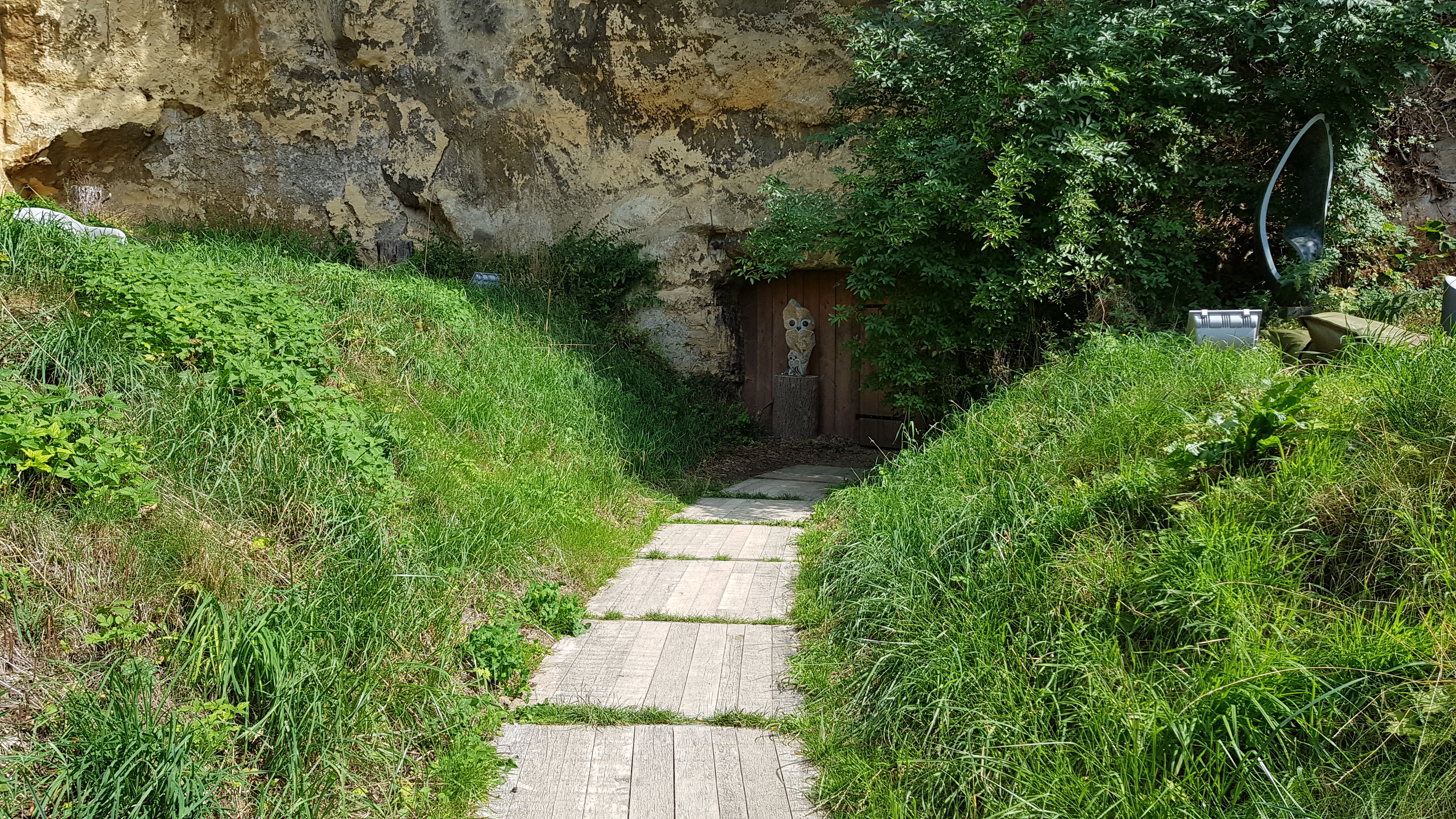 Scharnderberggroeve op Landgoed Heerdeberg, Cadier en Keer, Nederland